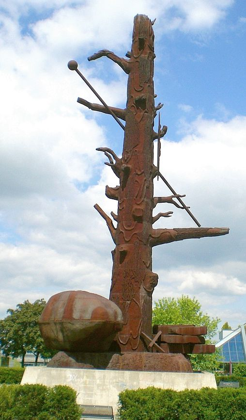 Stahlgussplastik „Elbquelle“ in Riesa von Jörg Immendorff